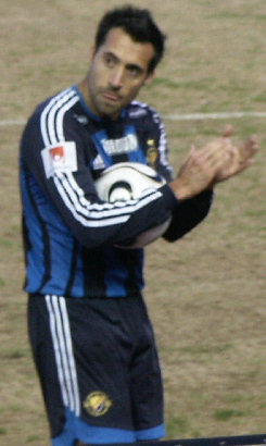 Matias Concha, Djurgårdens IF.